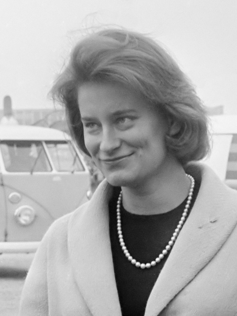 Aankomst prins Friedrich Wilhelm von Preussen op Schiphol, met zijn zuster prinses Kira 8 maart 1966